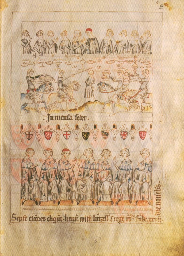 Codex Balduini Trevirensis: Die sieben Kurfürsten bei der Königswahl Graf Heinrichs von Luxemburg, die Erhebung des Gewählten am Wahlort Frankfurt am Main und seine Krönung, Salbung und Weihe in der Pfalzkirche Karls des Großen in Aachen, um 1340, Landeshauptarchiv Koblenz, Best. 1 C Nr. 1 fol. 3b